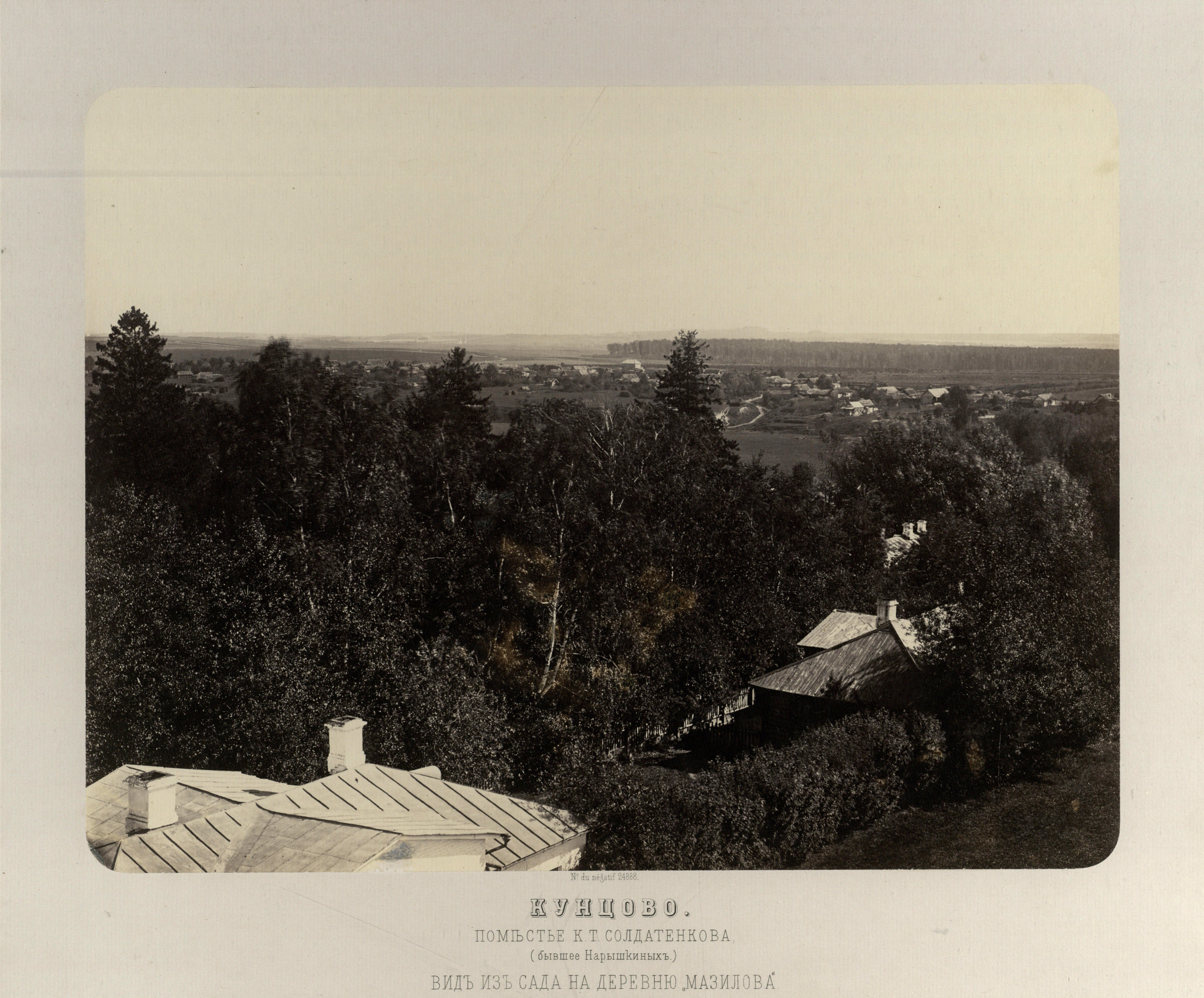 Вид на деревню Мазилово от усадьбы Солдатенкова (Нарышкиных) Кунцево.